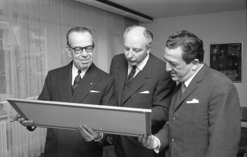 BM Scheel empfängt den türkischen Außenminister Erkin (mit Brille: der türkische Botschafter)